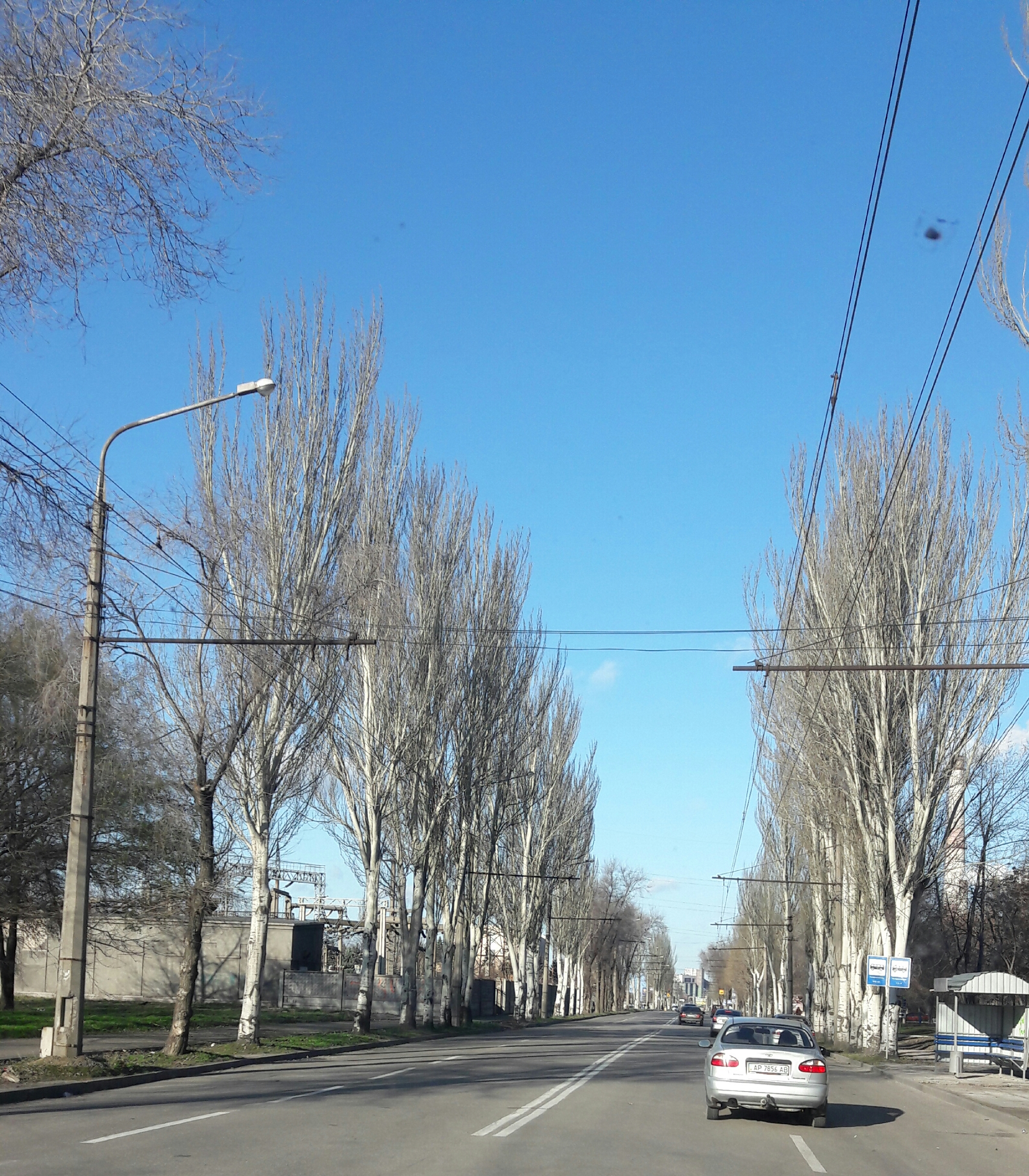 Zaporizhia, Sedova Street